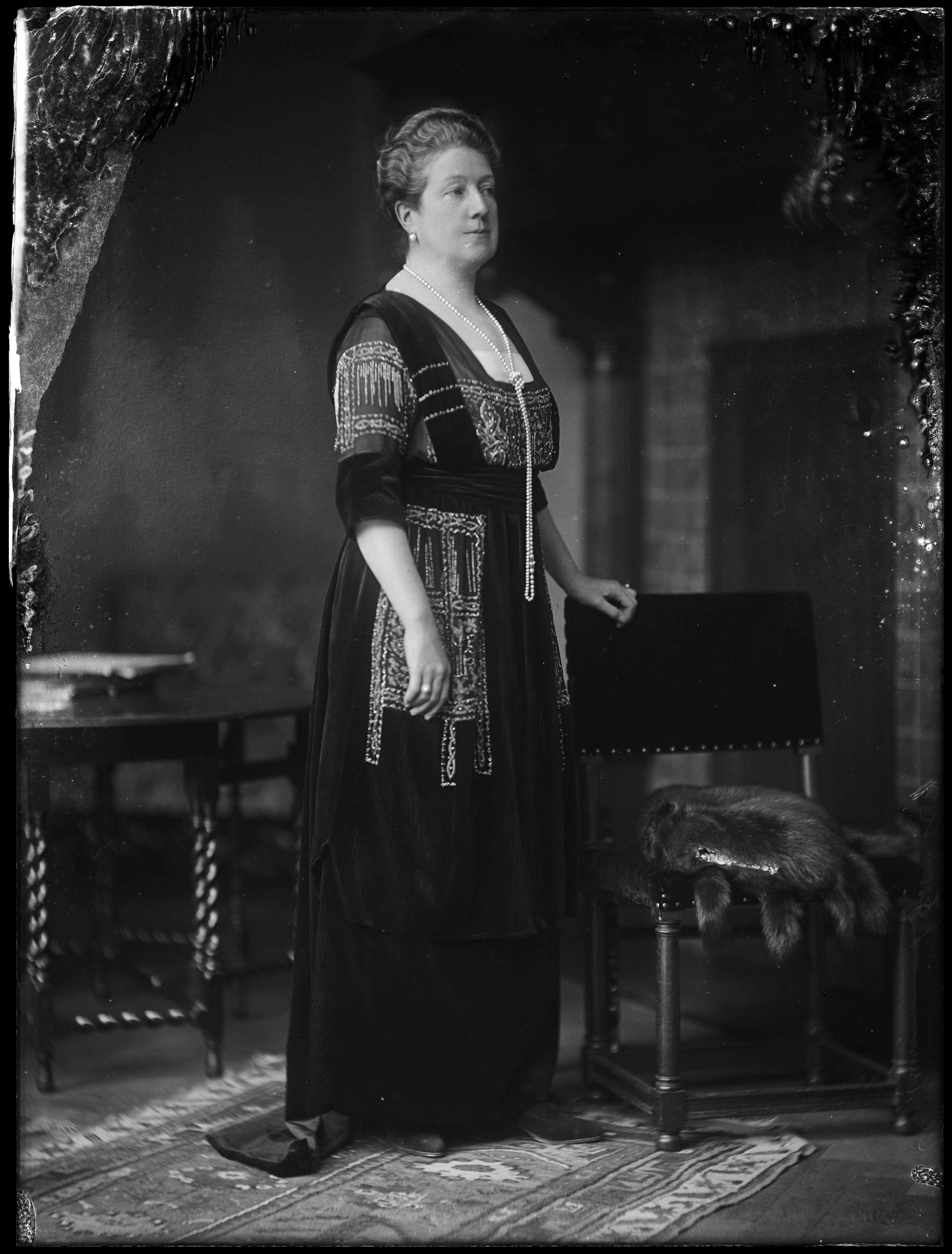 Portret van Thora van Loon-Egidius (1914), dame du palais van koningin Wilhelmina, door Jacob Merckelbach.